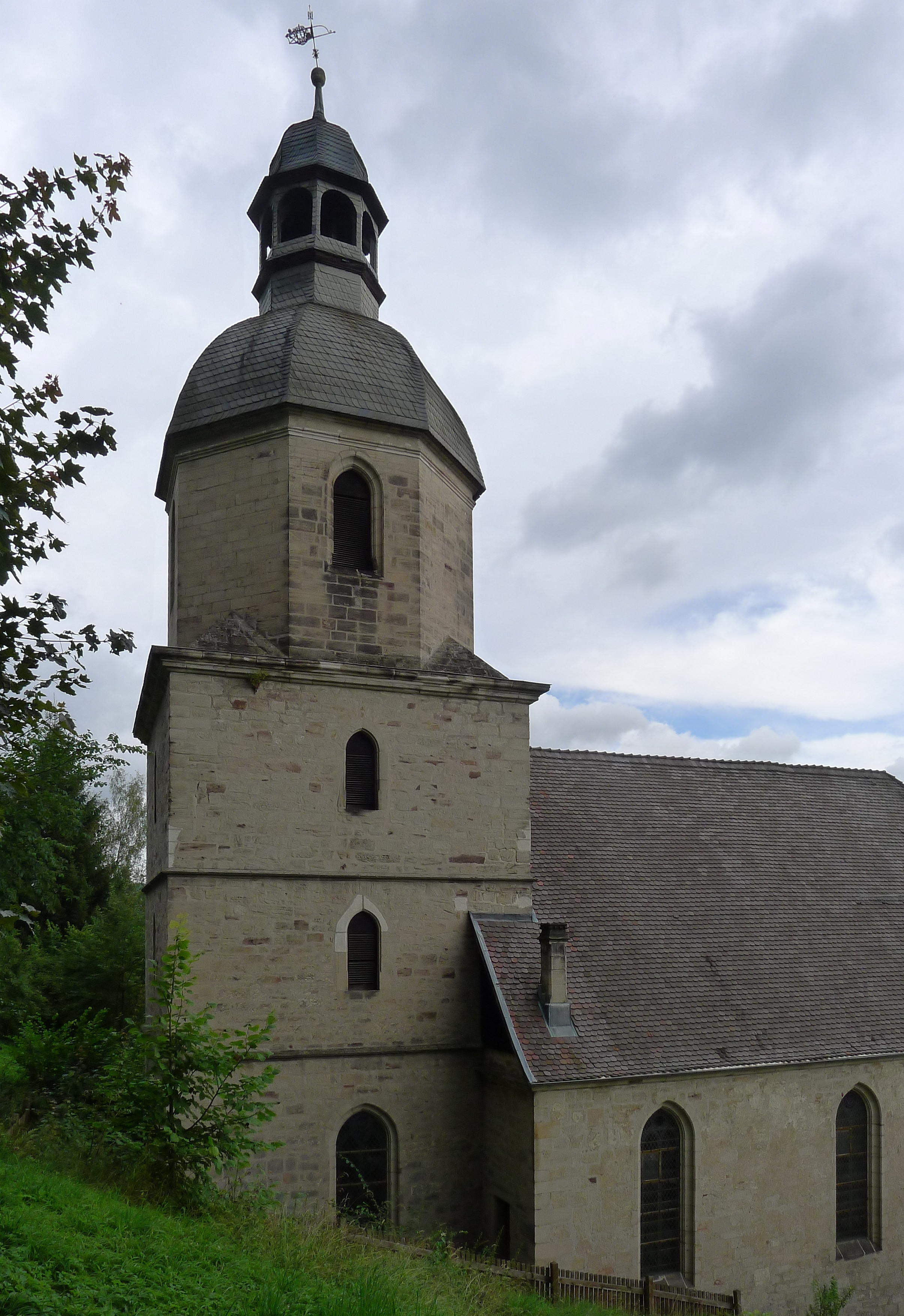 Glockenturm der Kirche